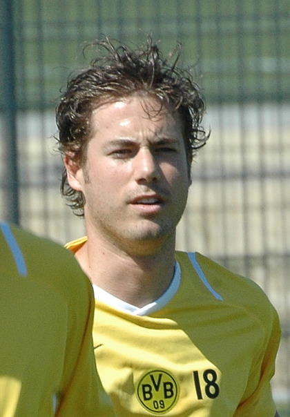 Lars Ricken beim Training von Borussia Dortmund